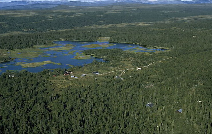 Fjällstation Motiv: Arådalen Nyckelord: Flygbilder, Riksintressen Kategori: Turisthotell Fjällstation.